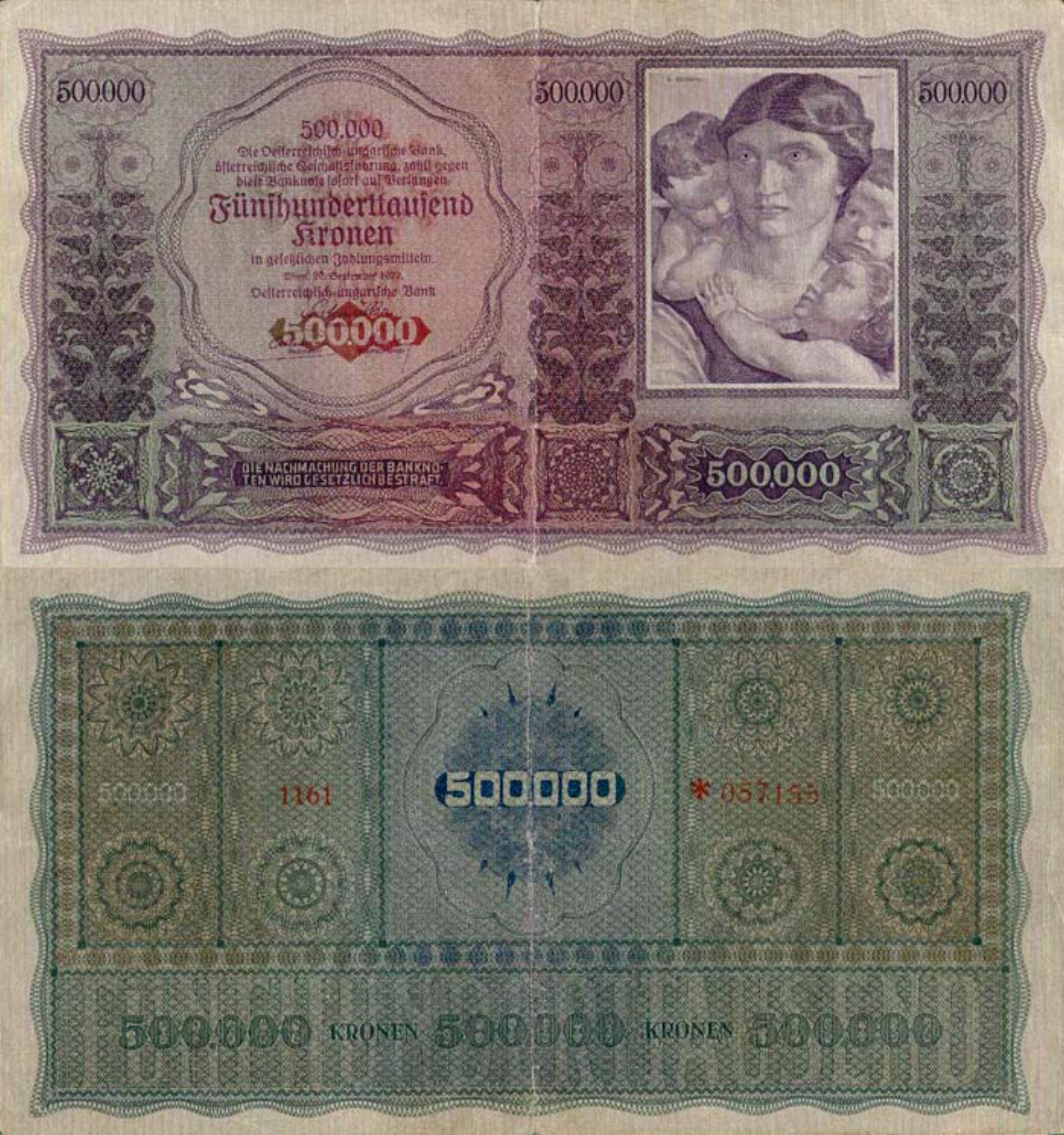 Österreichische Banknote von 1922 über 500.000 Kronen. - nicht mehr in Ungarn verwendbar.